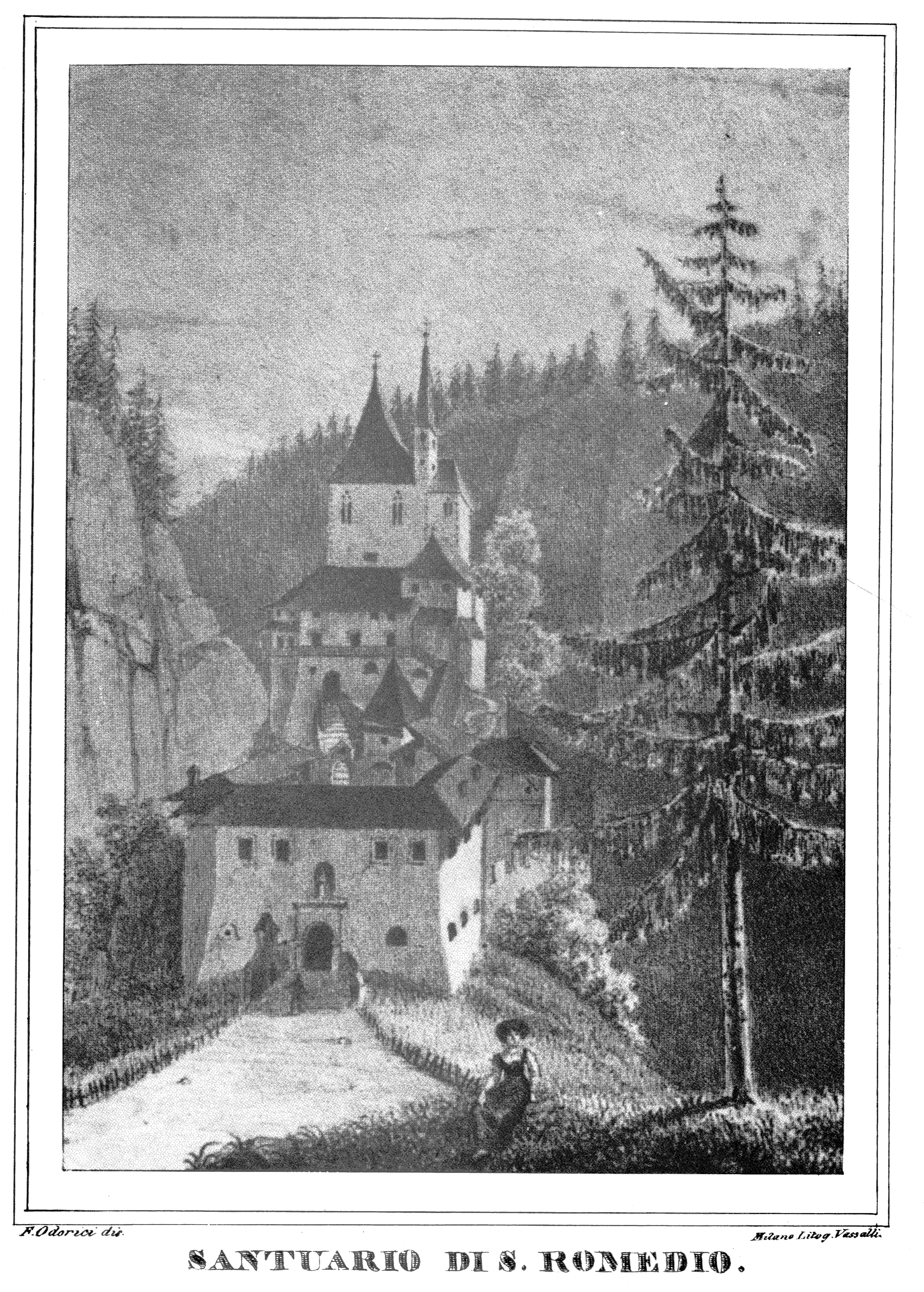 Veduta del santuario di San Romedio dal piazzale, circa 1829; da "La Naunia descritta al viaggiatore" di Gioseffo Pinamonti